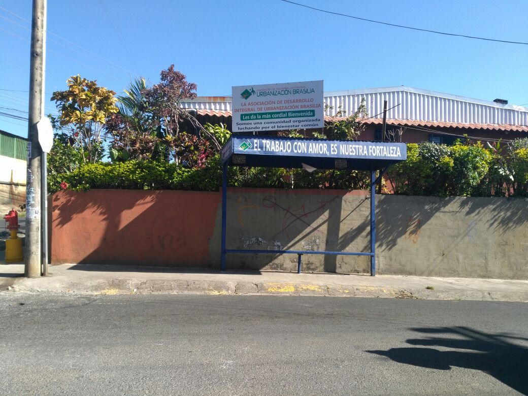 Foto de parada de bus de La Brasilia